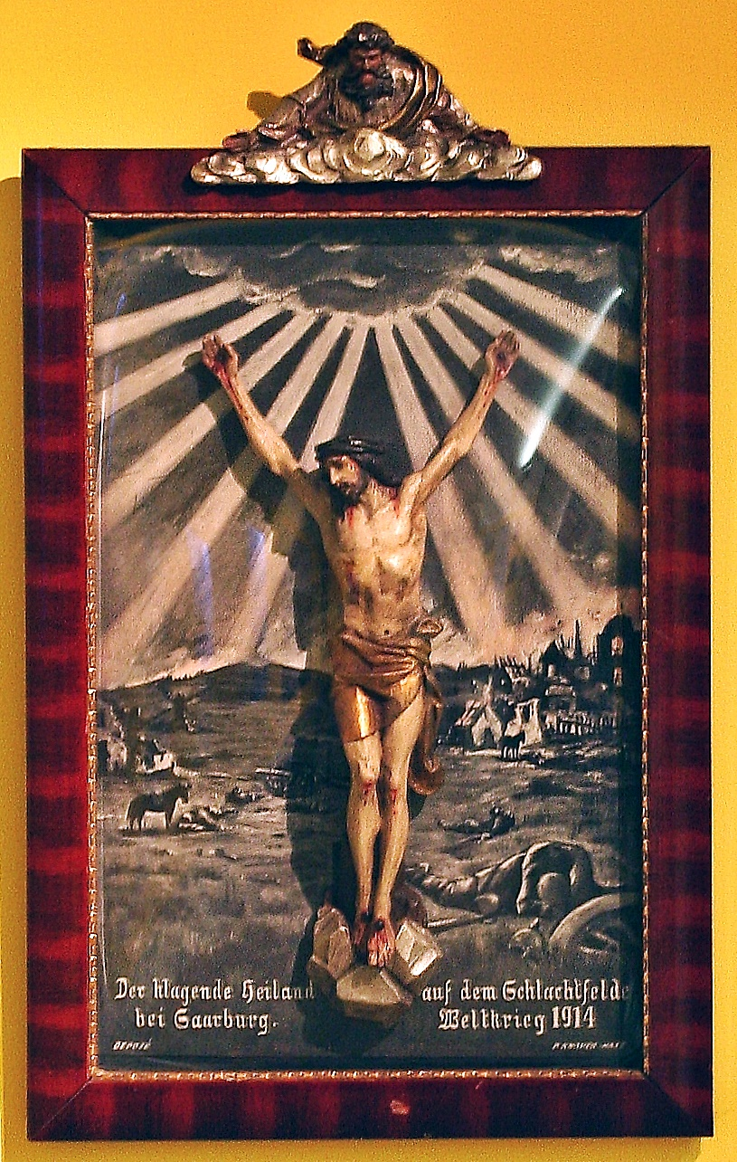 Plastische Darstellung des "Kreuzes von Saarburg" in der Sammlung des Bayerischen Armeemuseums (Inventar Nr. 0003-1998)